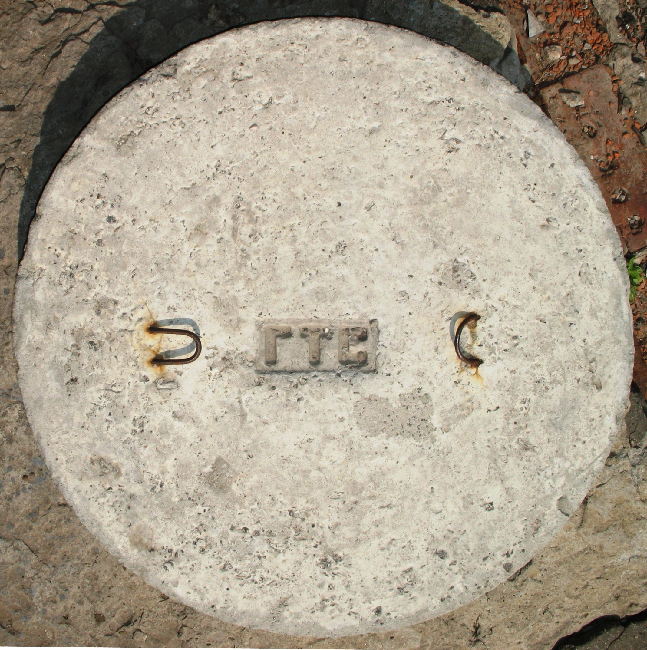 Укртелеком. Следствие экономических "реформ" 1990-х годов: бетонная крышка телефонного люка городской телефонной станции (ГТС Харькова) на месте украденной на металлолом чугунной. Лежит не в пазах смотрового колодца, а сверху него. Бетонными их льют для того, чтобы не имело смысла красть: очень тяжелы и ничего не стоят. Данные крышки запрещено размещать на проезжей части: при наезде легкового автомобиля неизбежна авария. Данная крышка на тротуаре. Центр Харькова, Нагорный район, улица Мироносицкая 79, угол ул. Маяковского.